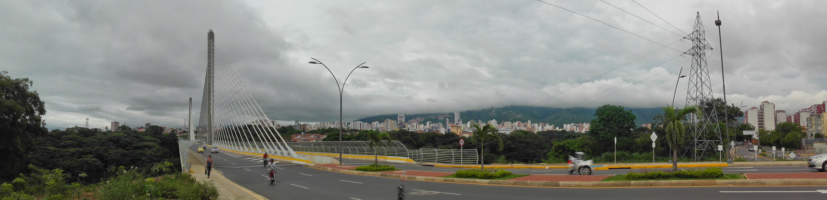 Viaducto Provincial de Bucaramanga SD, Colombia